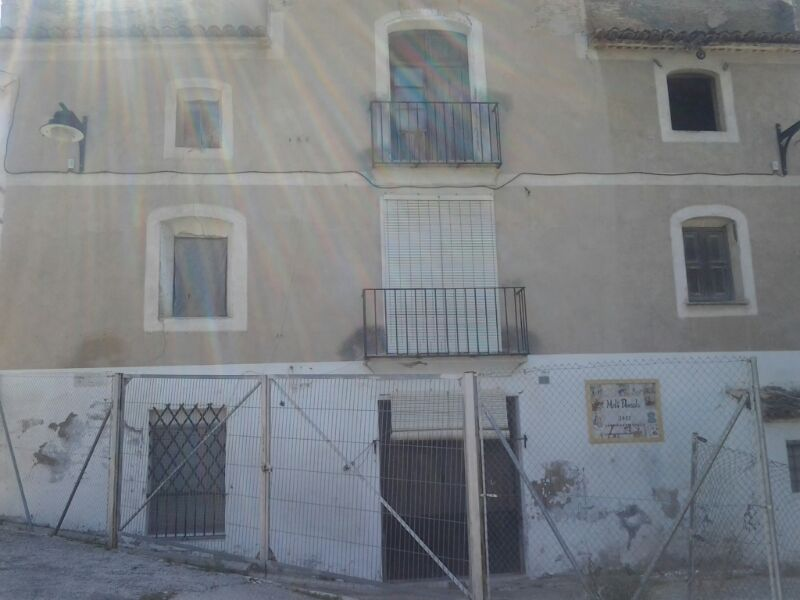 Façana del Molí Descals